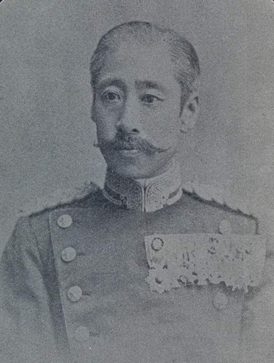 坊城俊章の肖像写真。